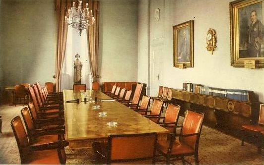 Stadskollegiets sessionssal, även Stora kollegiesalen, i Stockholms stadshus. Äldre vykort. "Sago-konst 3/39"